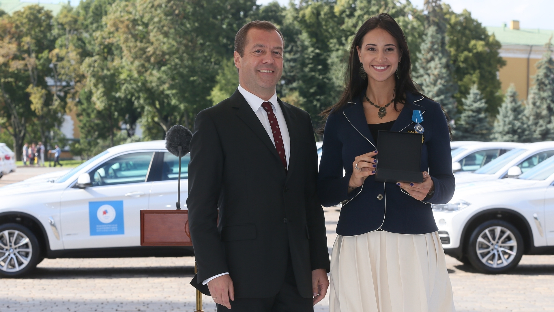 Дмитрий Медведев и Яна Егорян